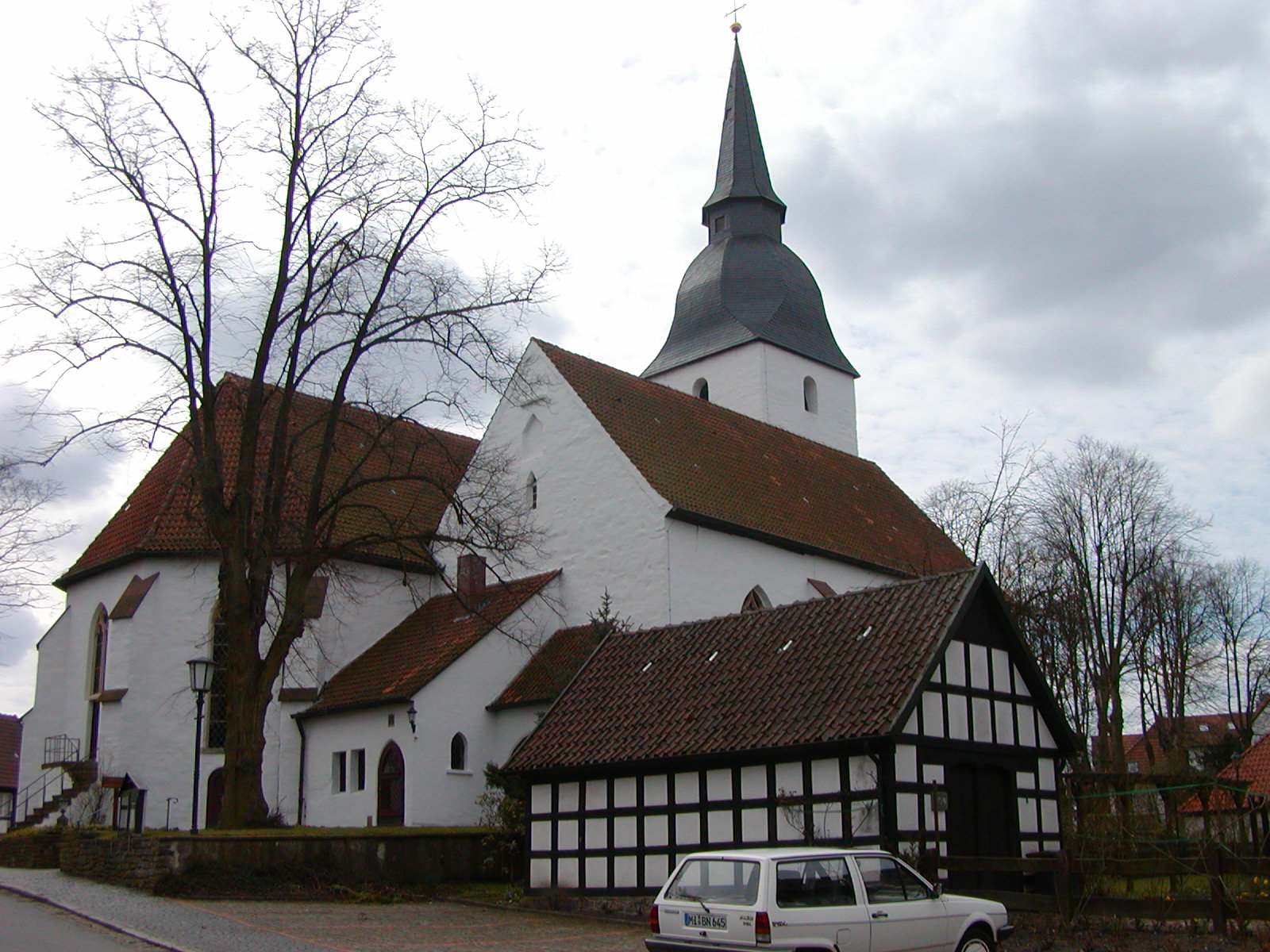 Kirche in Stemwede-Levern This image shows a heritage building in Germany, located in the North Rhine-Westphalian city Stemwede (no. 004).